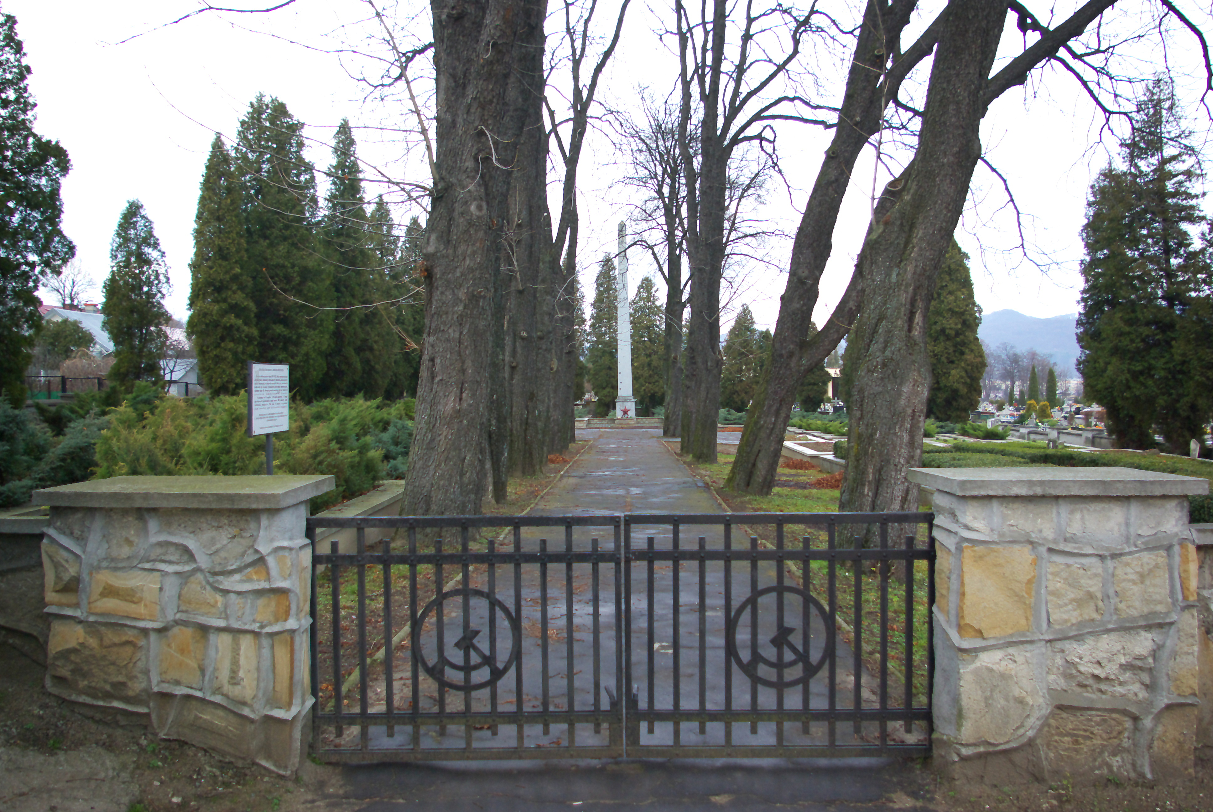 Kwatera żołnierzy armii radzieckiej na Cmentarzu Centralnym w Sanoku.